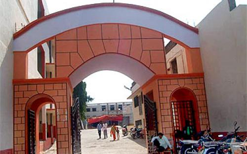 बलभीम महाविद्यालय, बीड